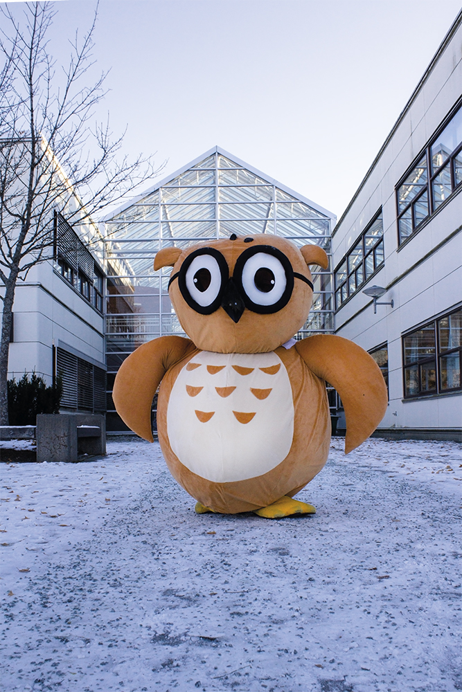 Knølle, Erudio sin maskot